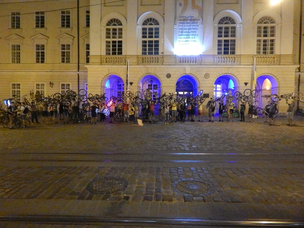 ФінішКМ